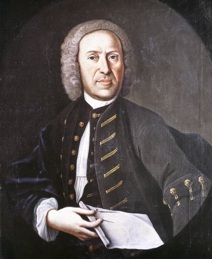 Peter Thumb um 1740. Scan aus Literatur (1960 und 1972 schwarzweiß veröffentlicht, hier koloriert durch Verfasser nach farbiger Veröffentlichung). Original Privatbesitz.